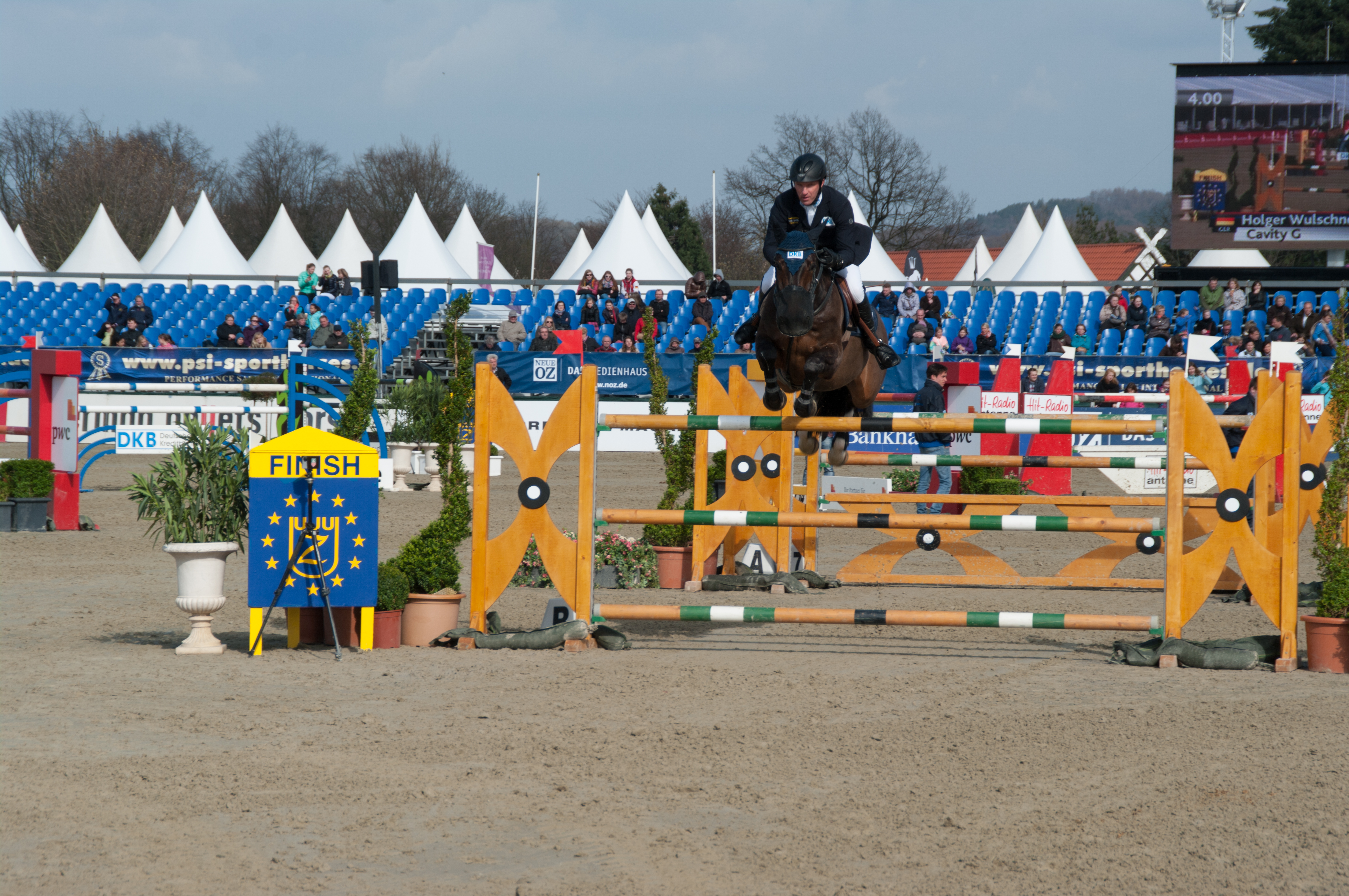 Horses & Dreams 2013: Holger Wulschner mit Cavity G